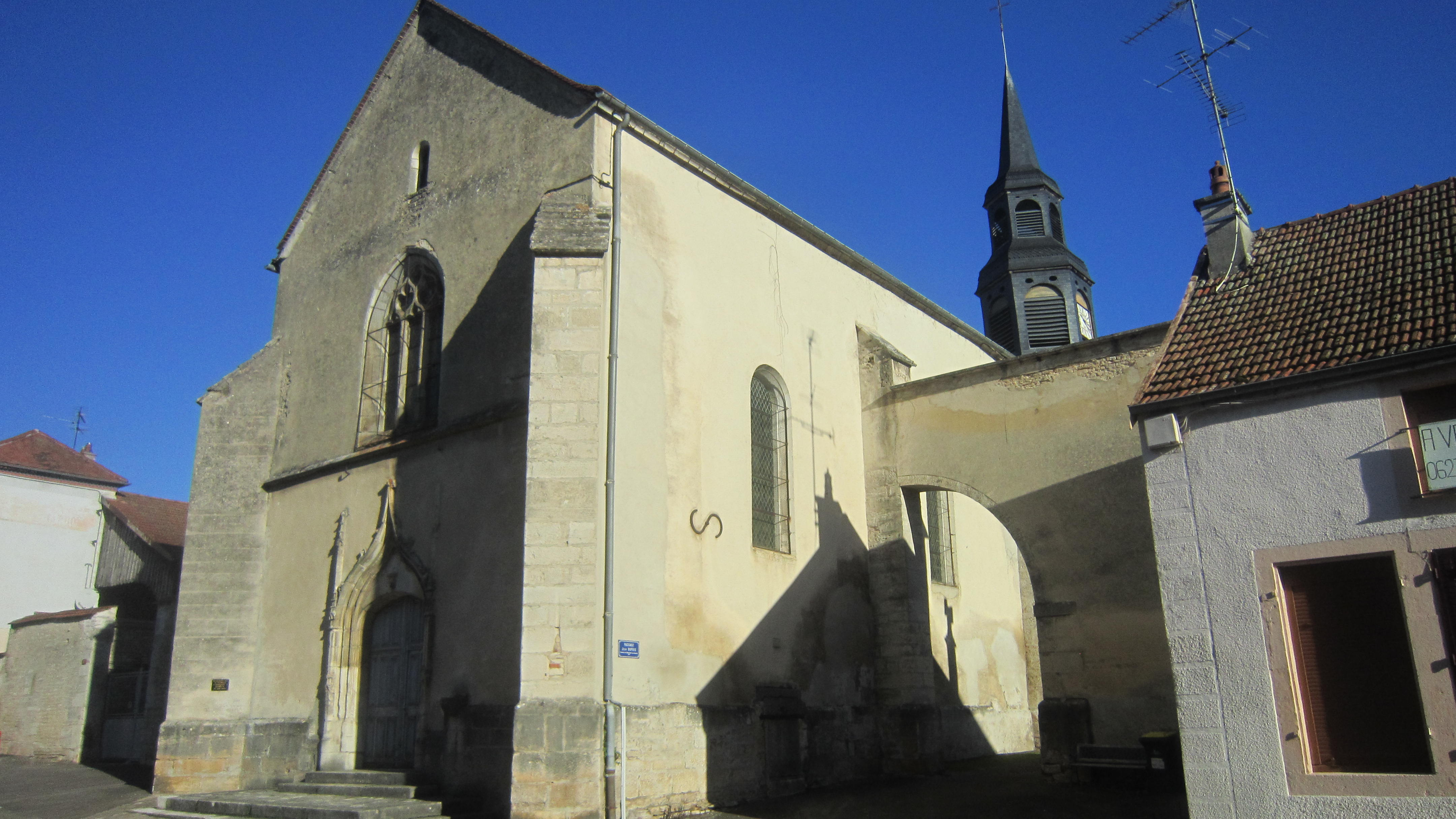 Eglise Saint-Jean Baptiste à Châtillon-sur-Seine